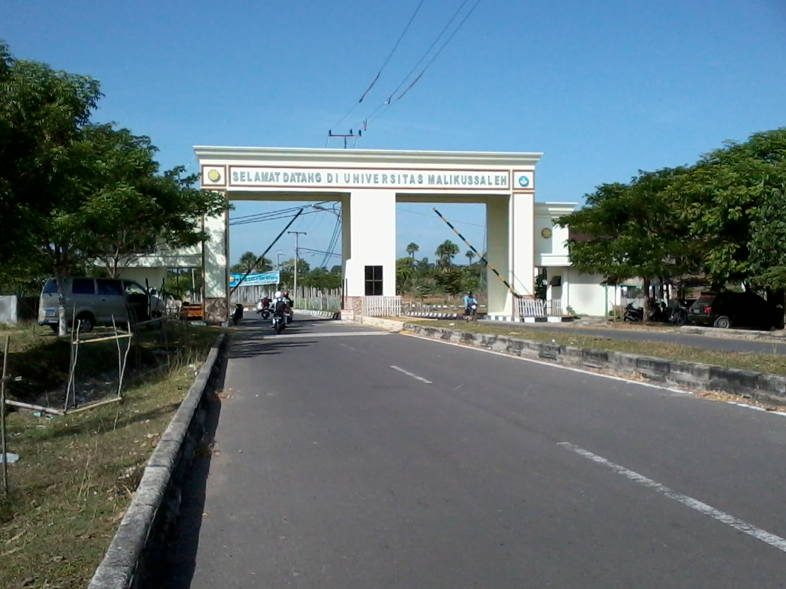 Pintu gerbang Kampus Reuleuet